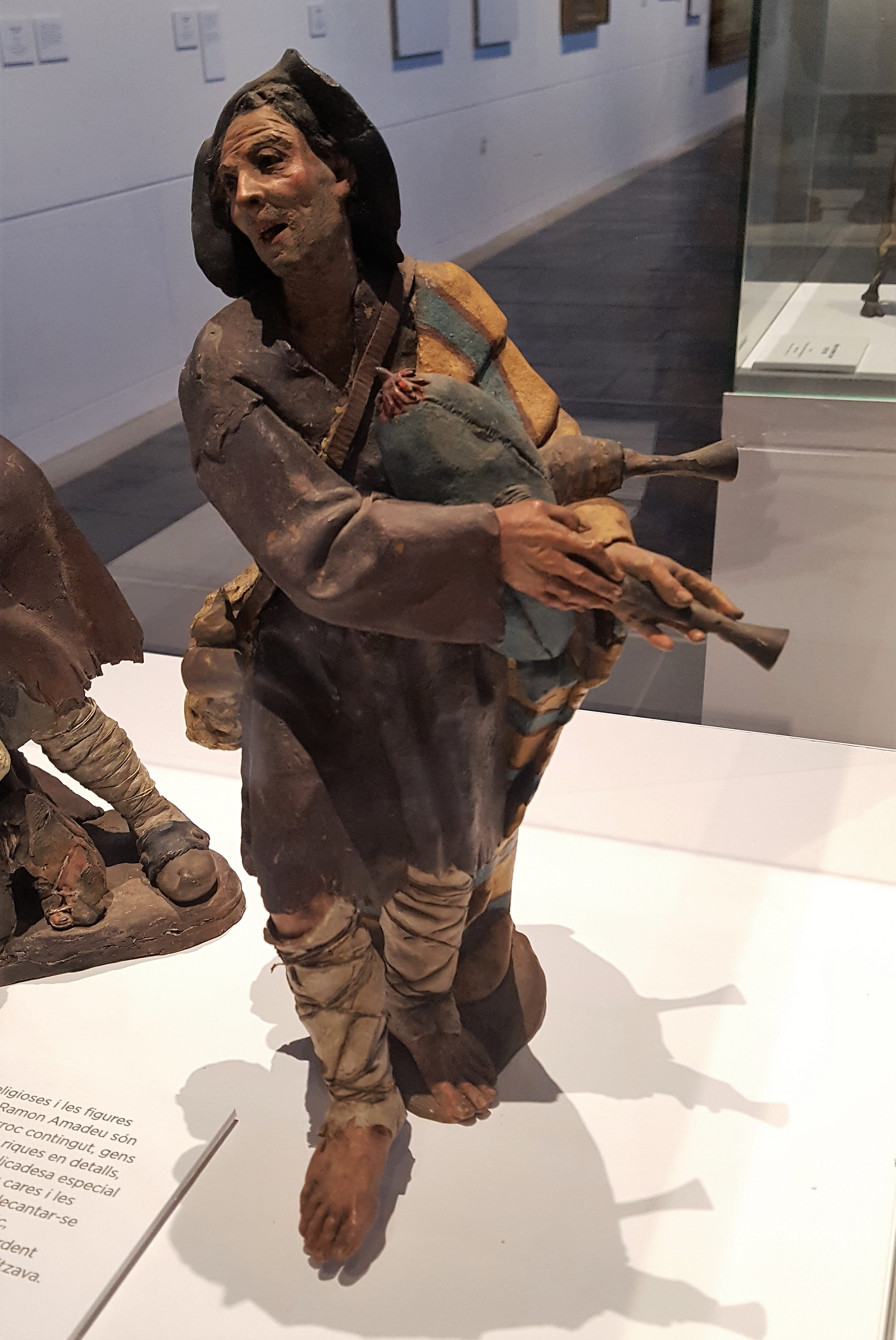 Ramon Amadeu: Musiker (Zwischen 1809 und 1821, Terrakotta, Museu Comarcal de la Garrotxa Olot)